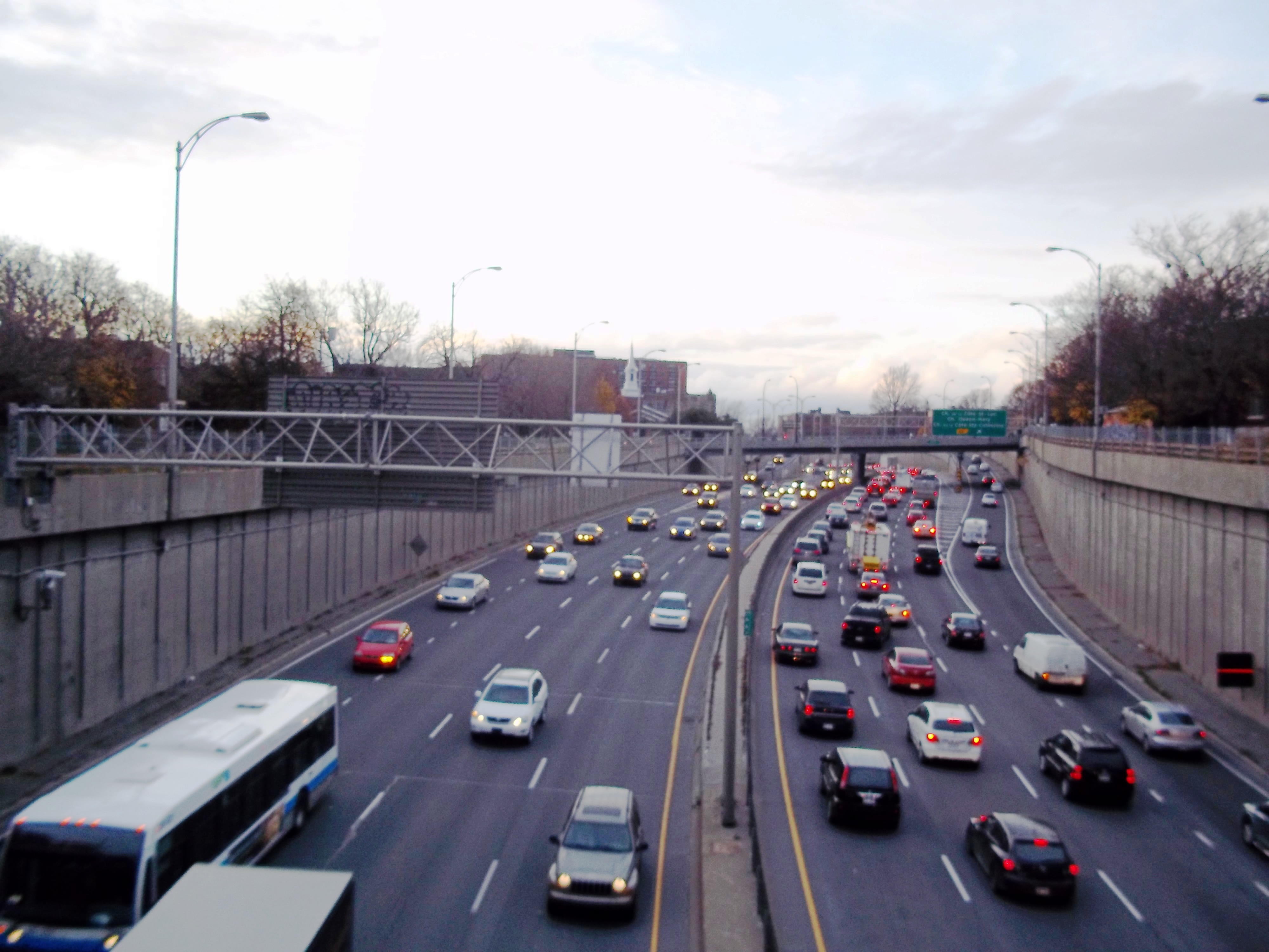 Autoroute Décarie, vue de l'avenue Notre-Dame-de-Grâce, vers le sud